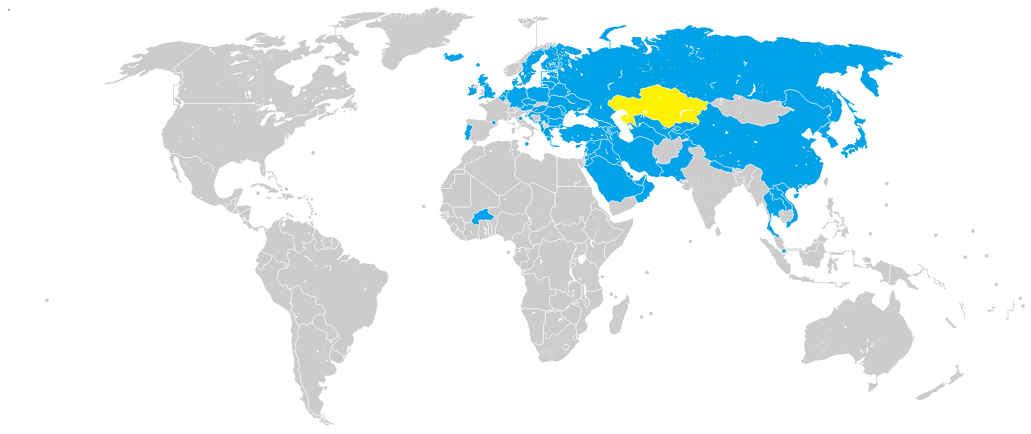 Все соперники сборной Казахстана по футболу